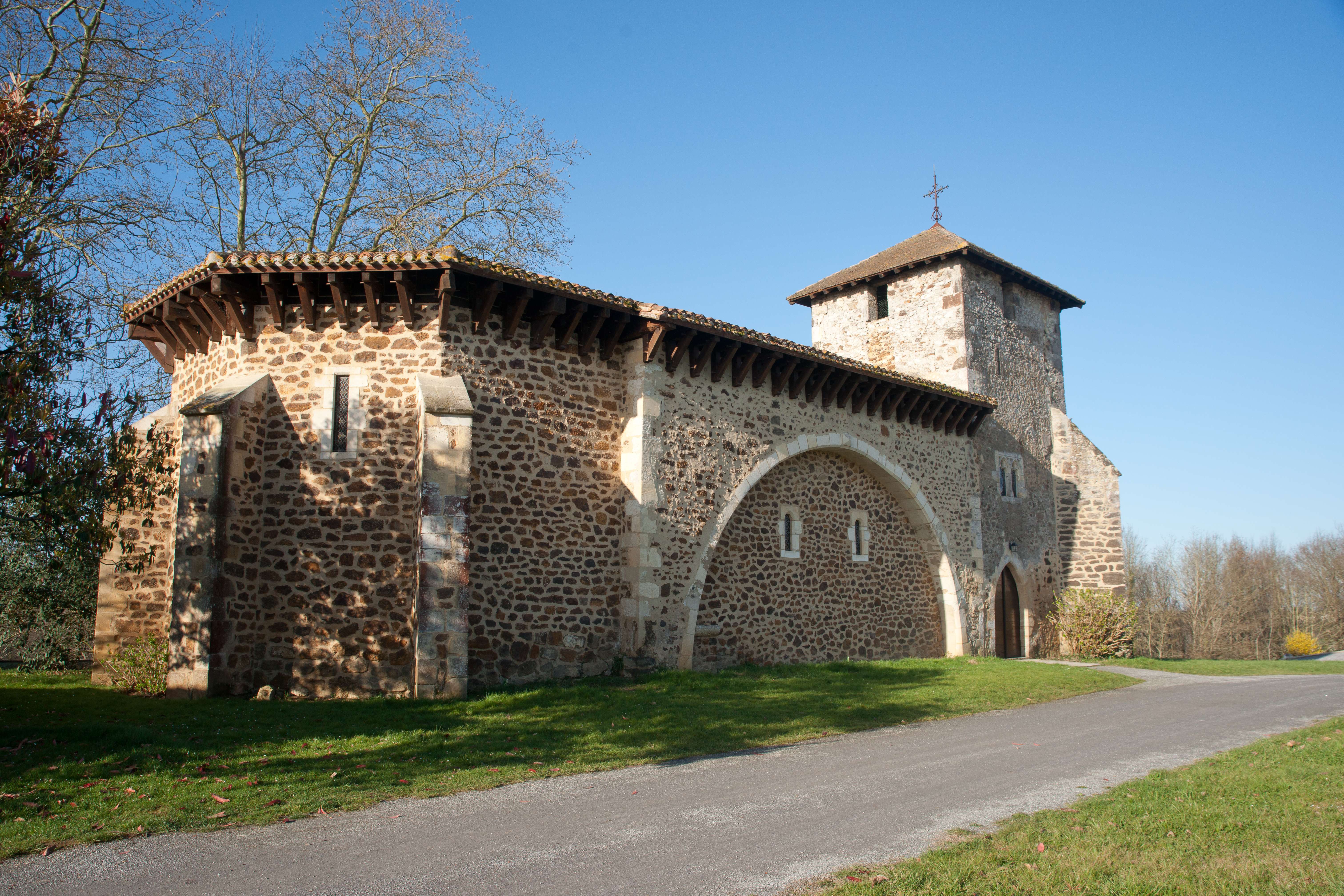 Abbaye Notre-Dame de Maylis